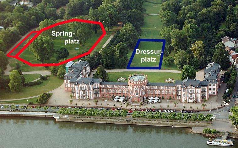 Lageplan: Turnierplätze beim Internationalen Pfingstturnier Wiesbaden im Schlosspark Biebrich, Wiesbaden